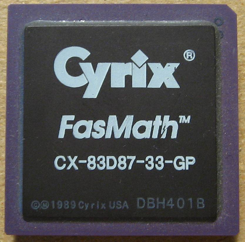 Cyrix FasMath 83D87 FPU